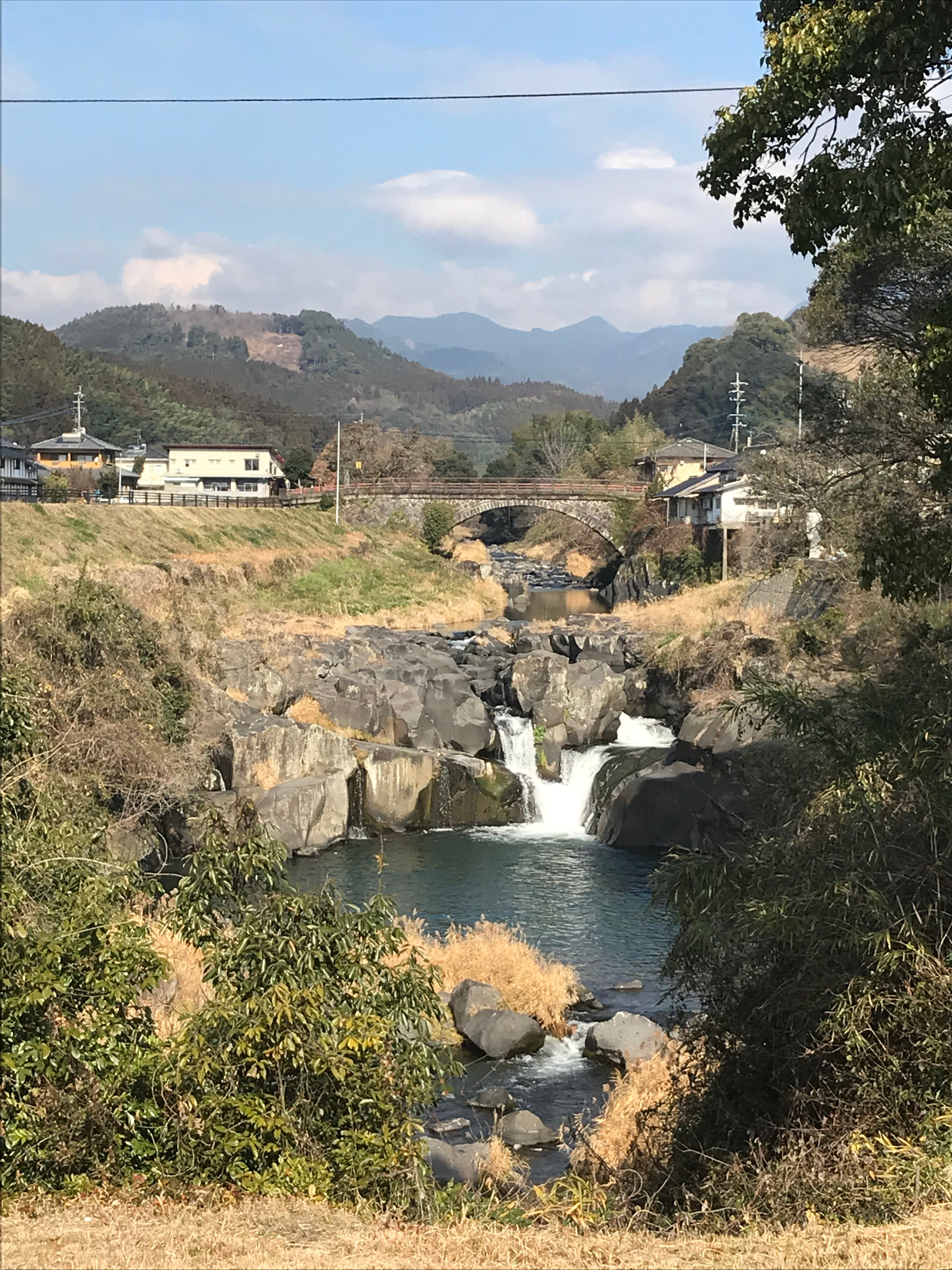 熊本県菊池市にあります。２０１９年１月１９日撮ったものです。